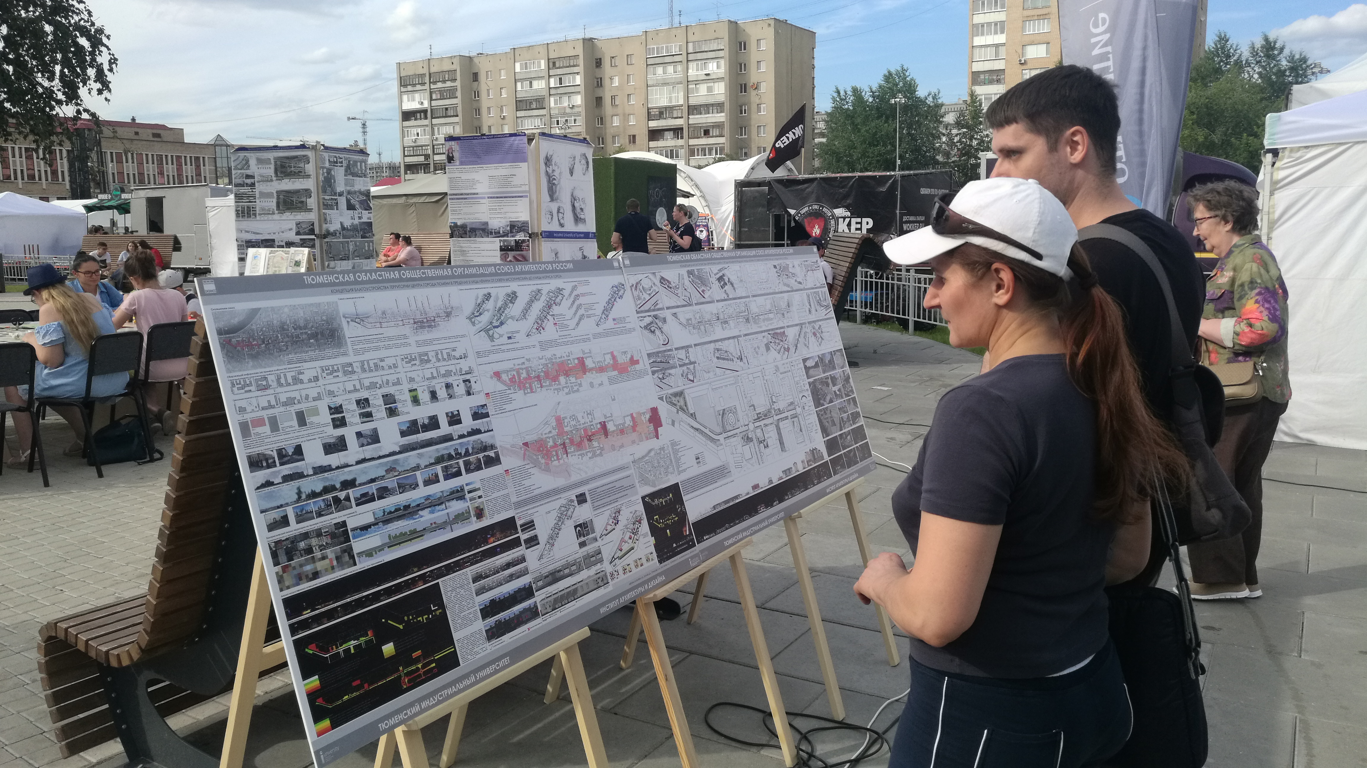 Stando pri rekonstruo de strato Lenin. Tjumeno, Rusio.